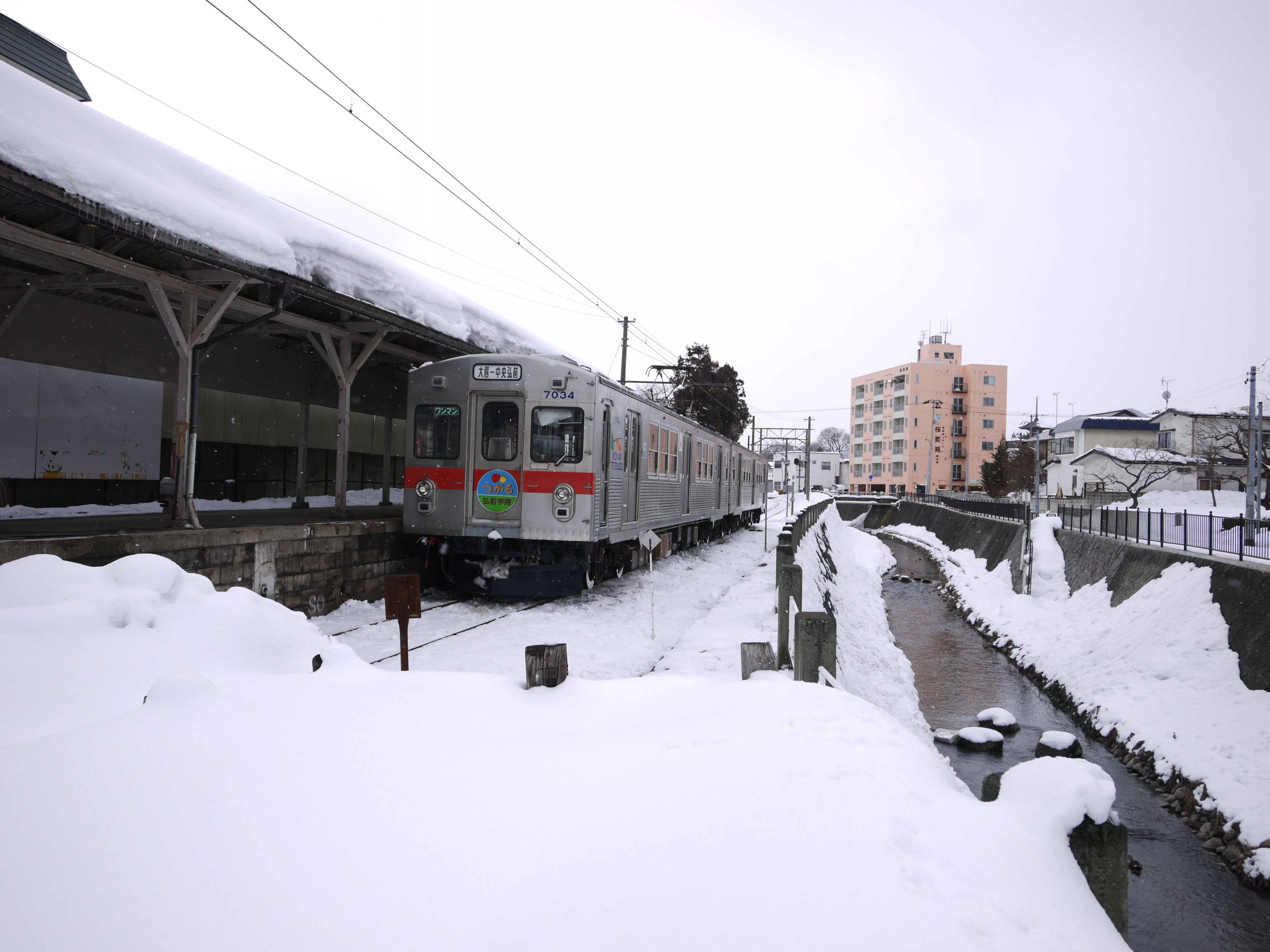 弘南鉄道 中央弘前駅